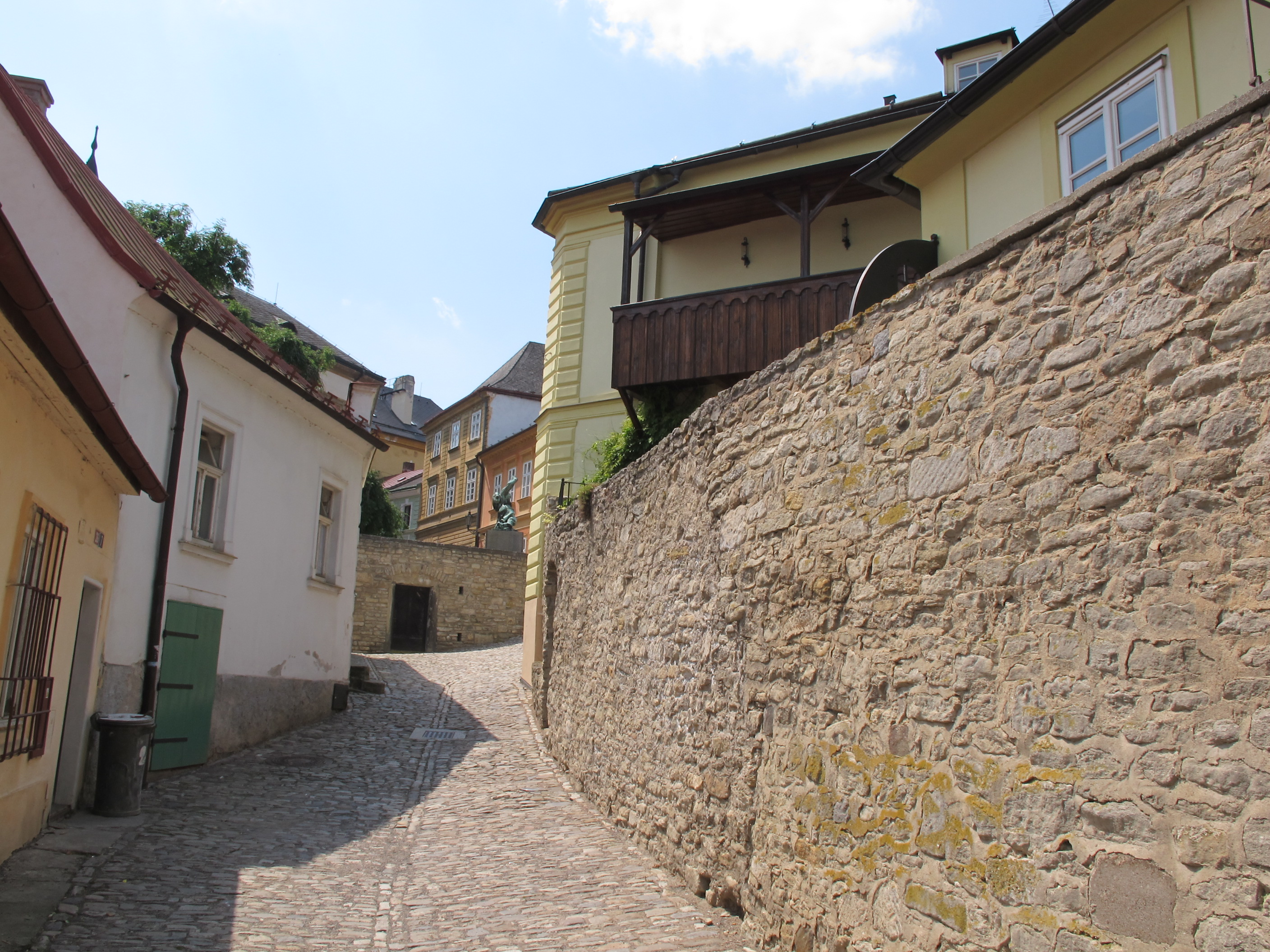 Ruthardská ulice v Kutné Hoře